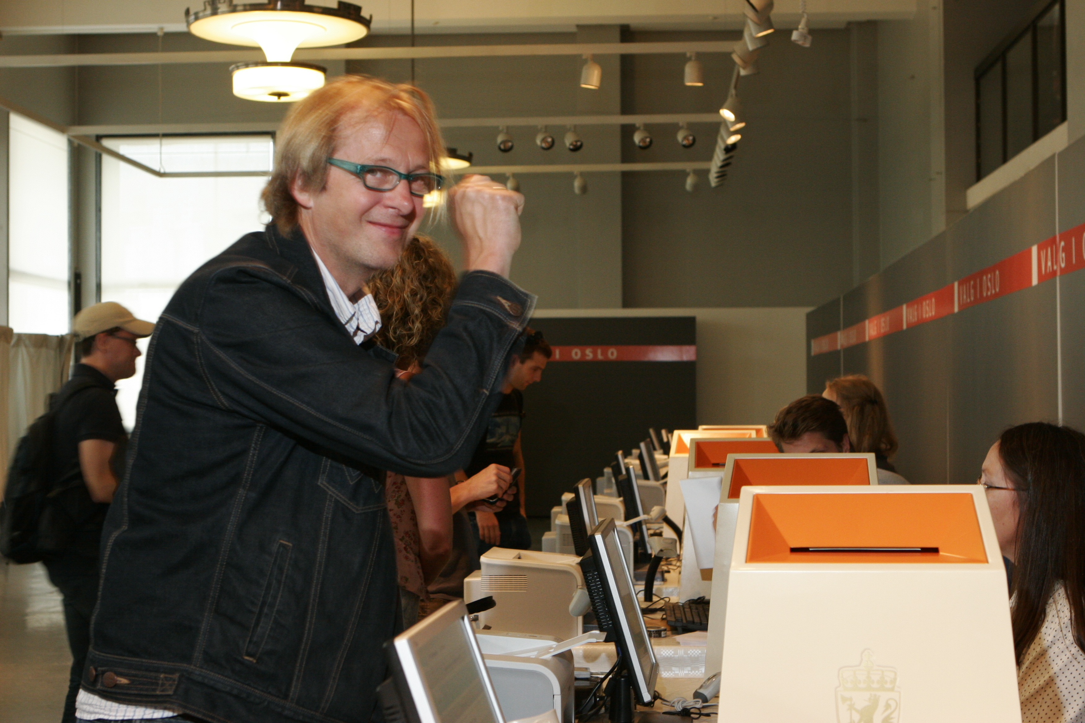 Lars Lillo-Stenberg forhåndsstemmer ved kommunestyre- og fylkestingsvalget 2011.